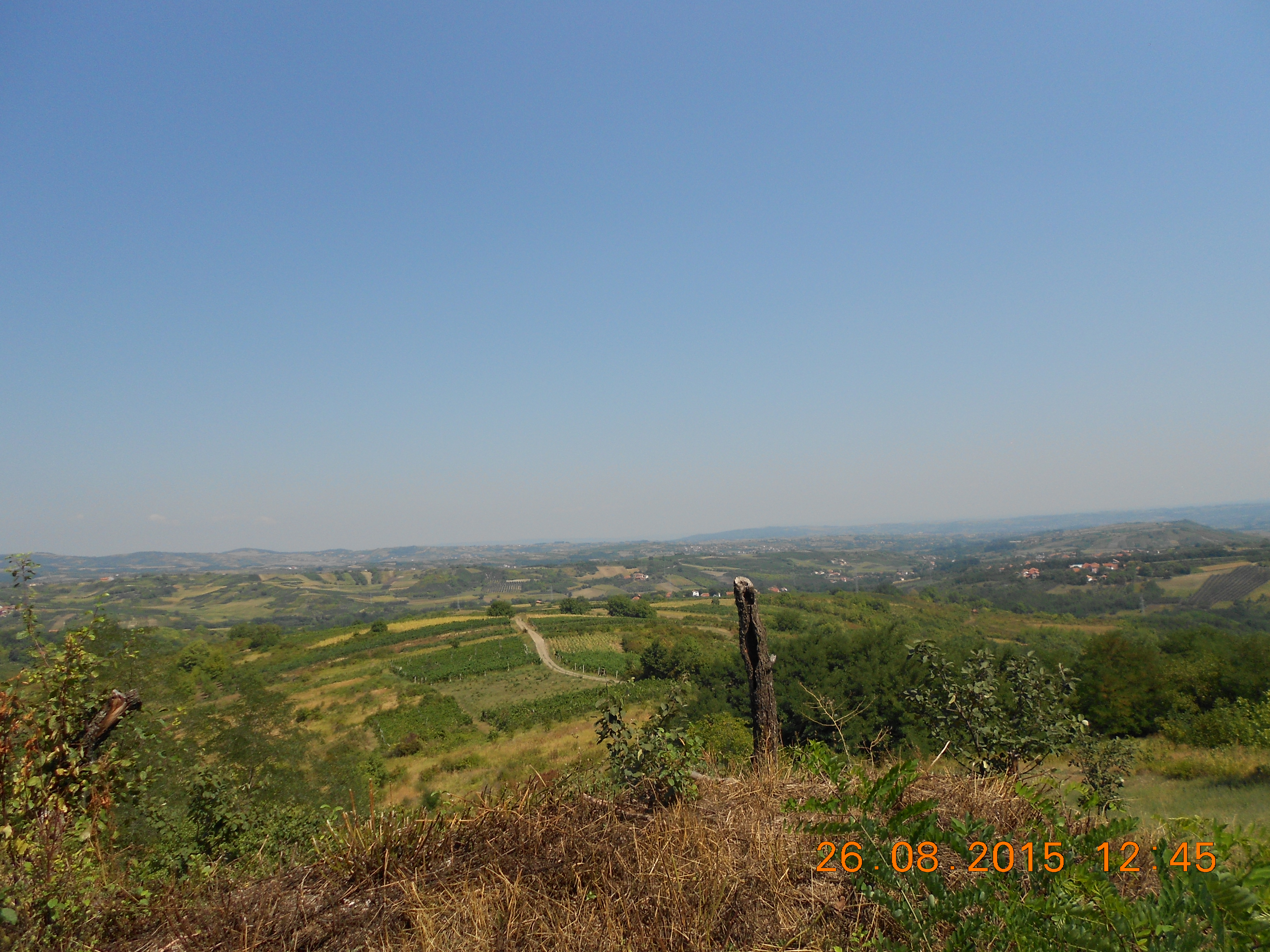 Поглед на Стубал са Чукаре